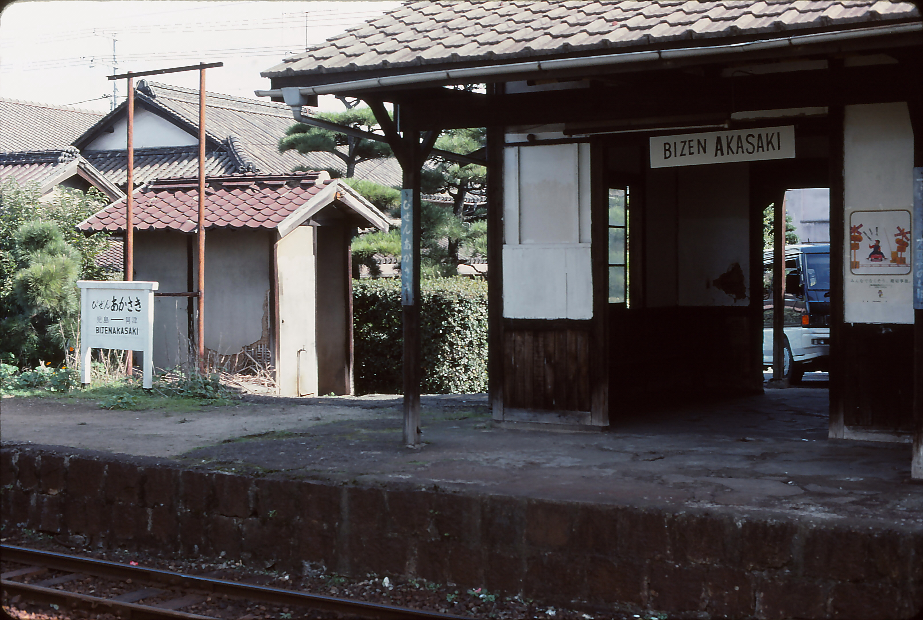 下津井電鉄備前赤崎駅